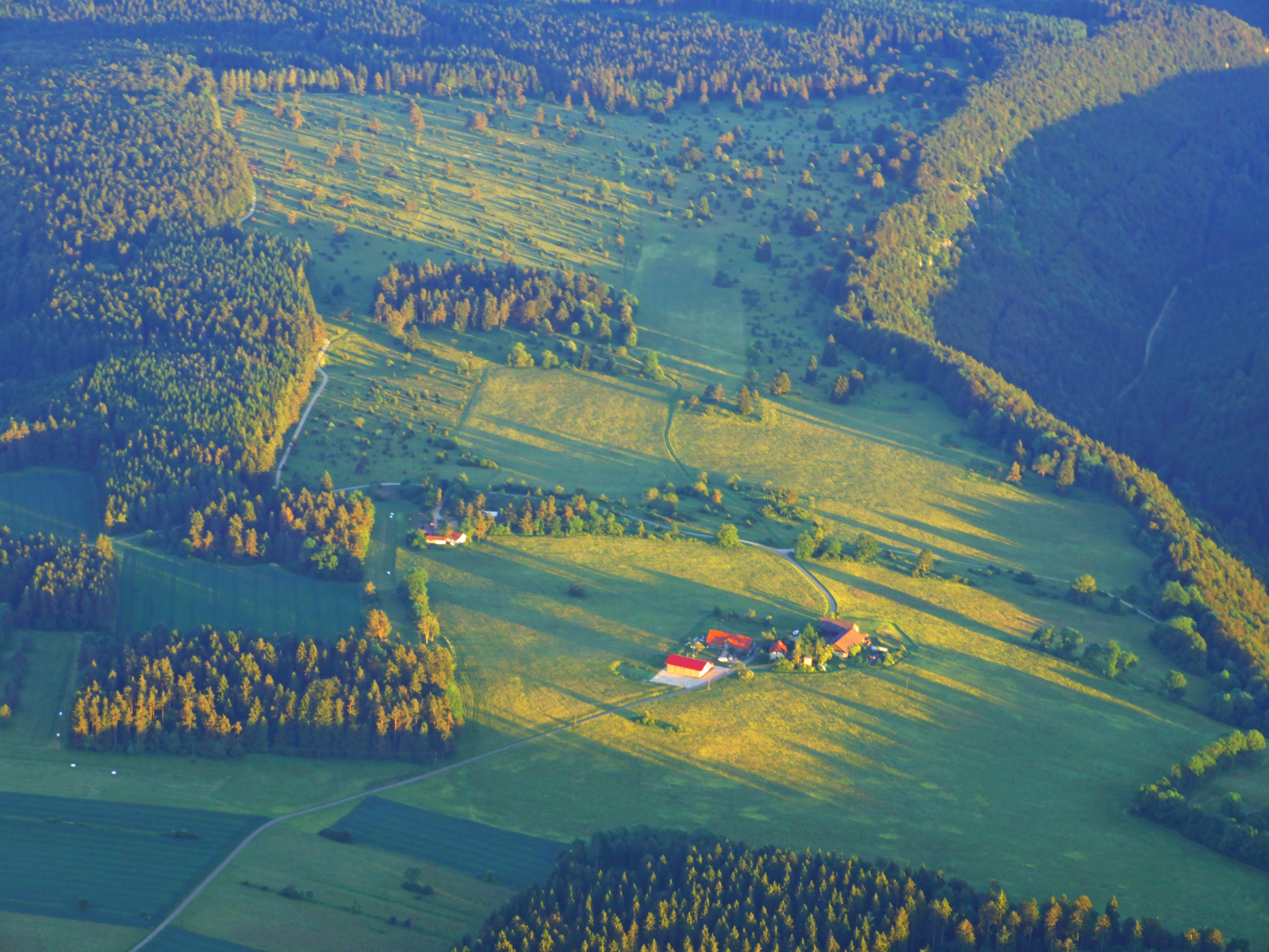 Kraftstein